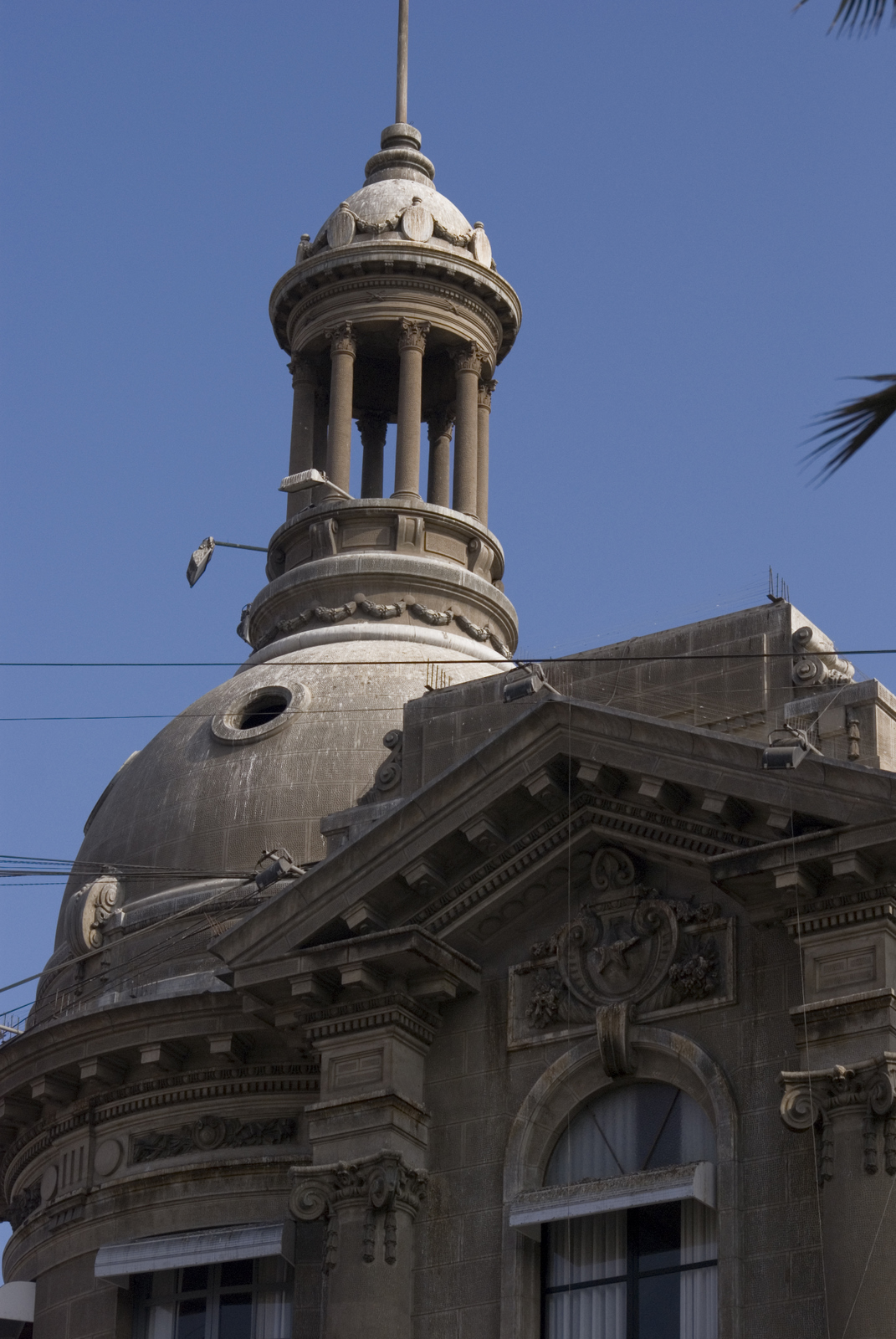 Cúpula de la biblioteca Regional de Antofagasta, antiguo edificio de los Servicios Públicos.